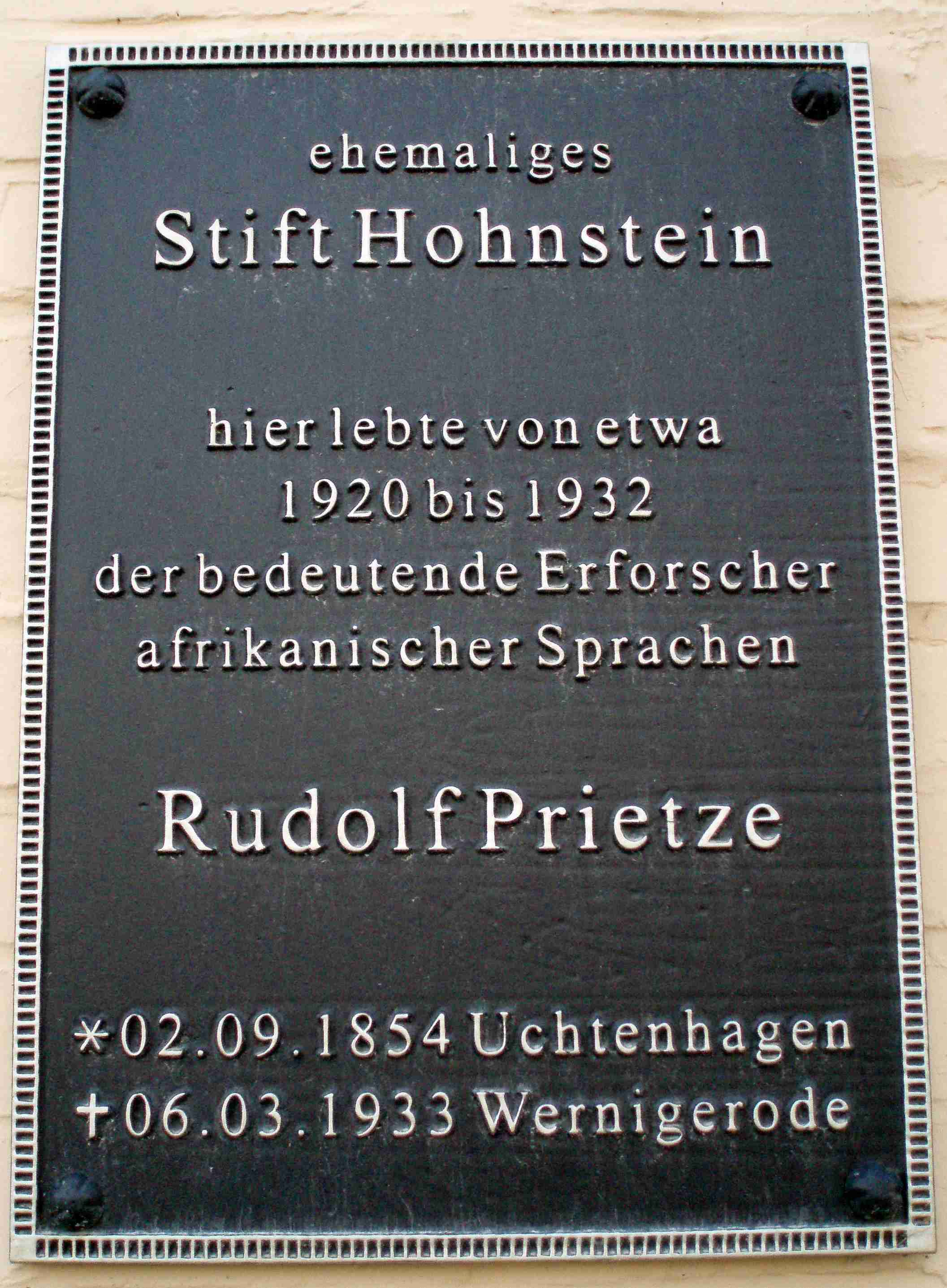 Prietze-Tafel